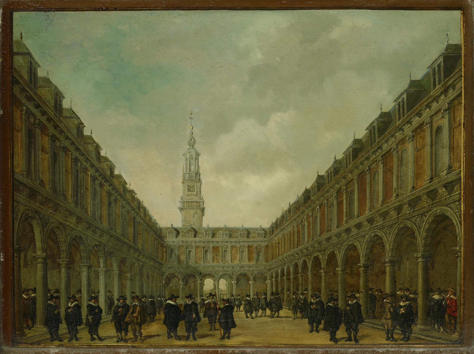 schilderij; stadsgezicht Amsterdam; Beurs de Keyser; Rokin